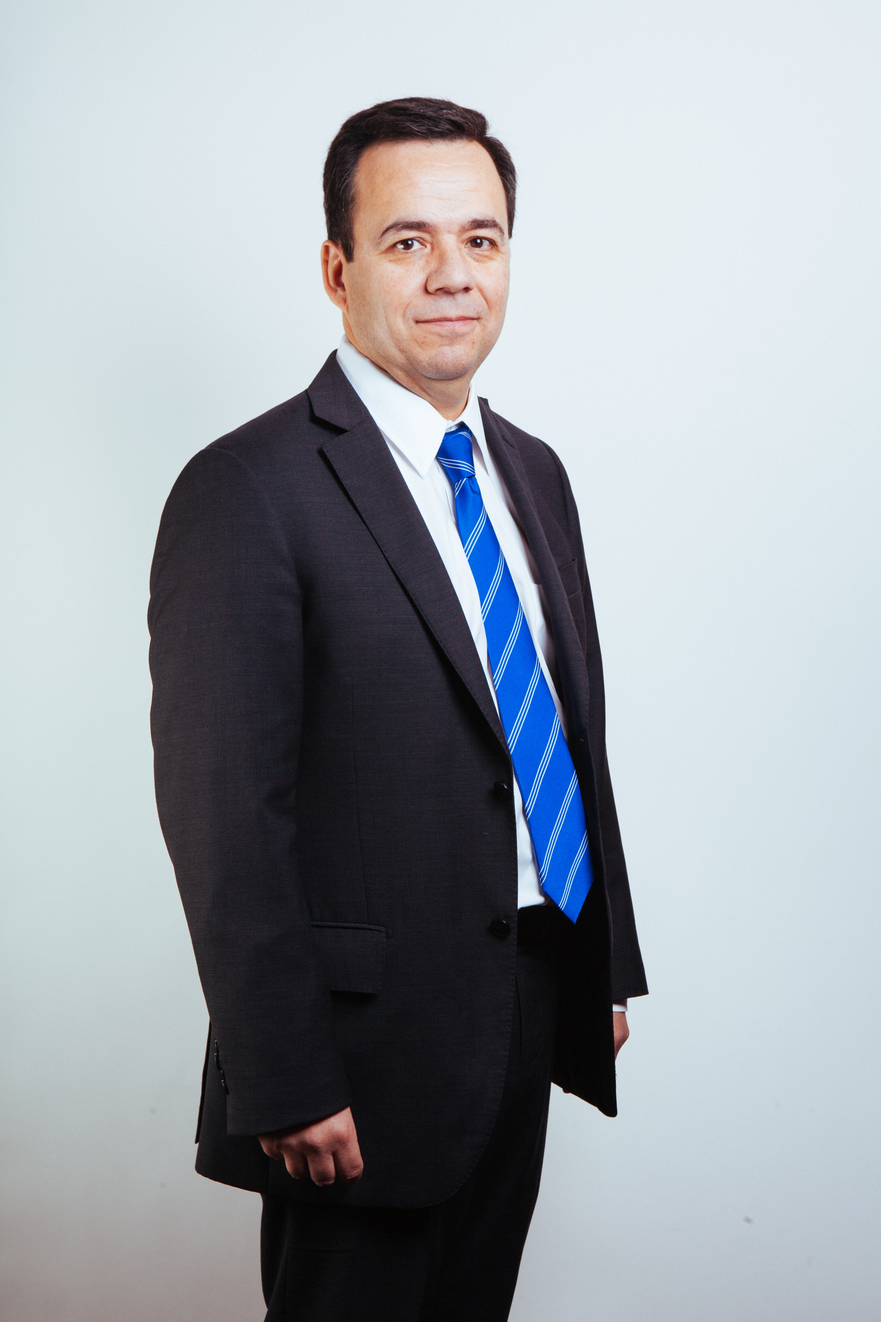 Ministro de Estado del segundo gobierno de Michelle Bachelet (2014-2018)